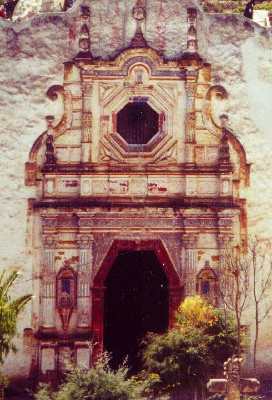 Templo de la Cruz de Santa Teresa en Cardonal - copia